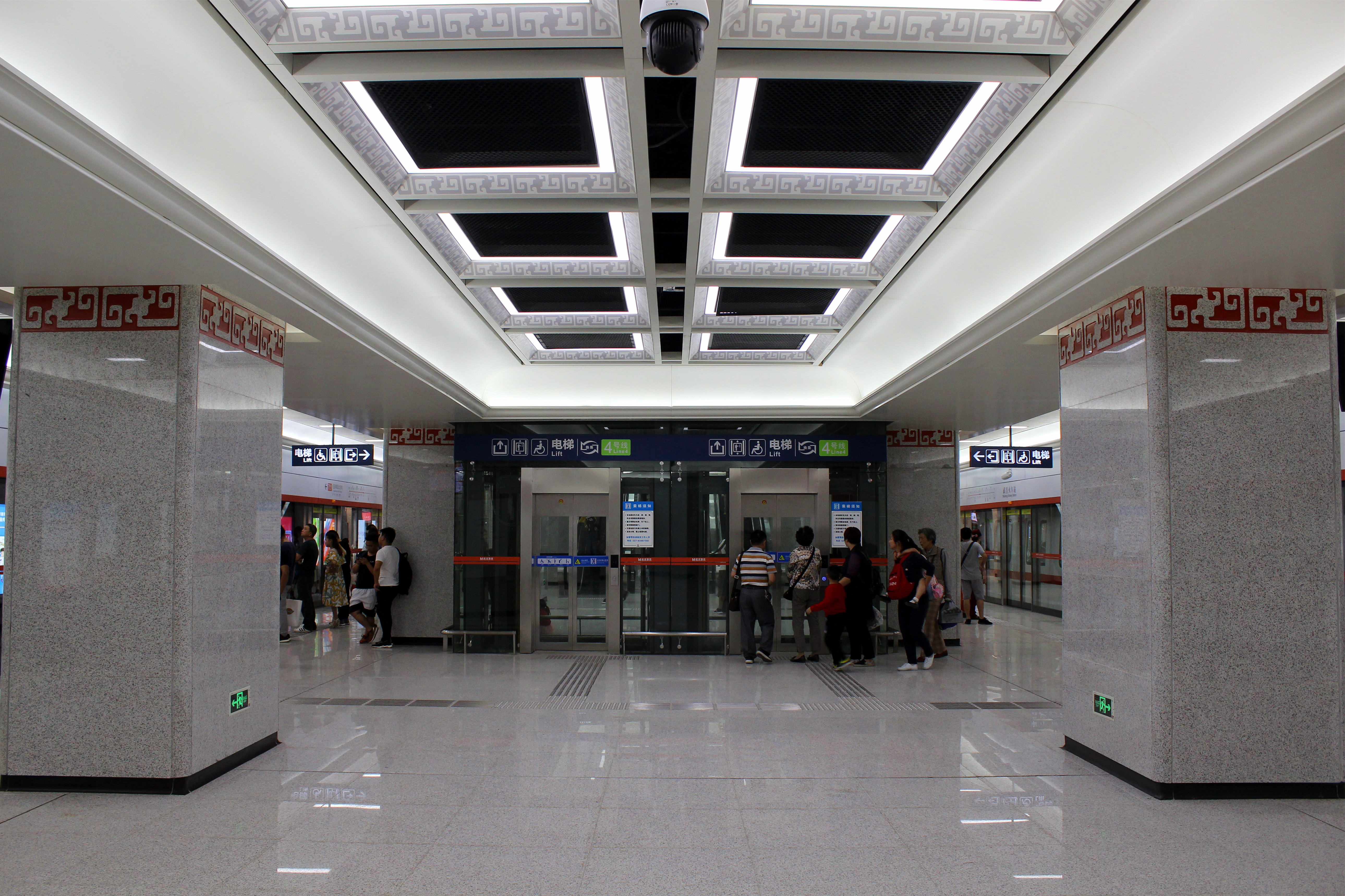 武汉地铁7号线武昌火车站站台